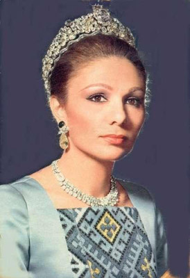 Portrait de SMI Farah Chahbanou, impératrice consort d'Iran